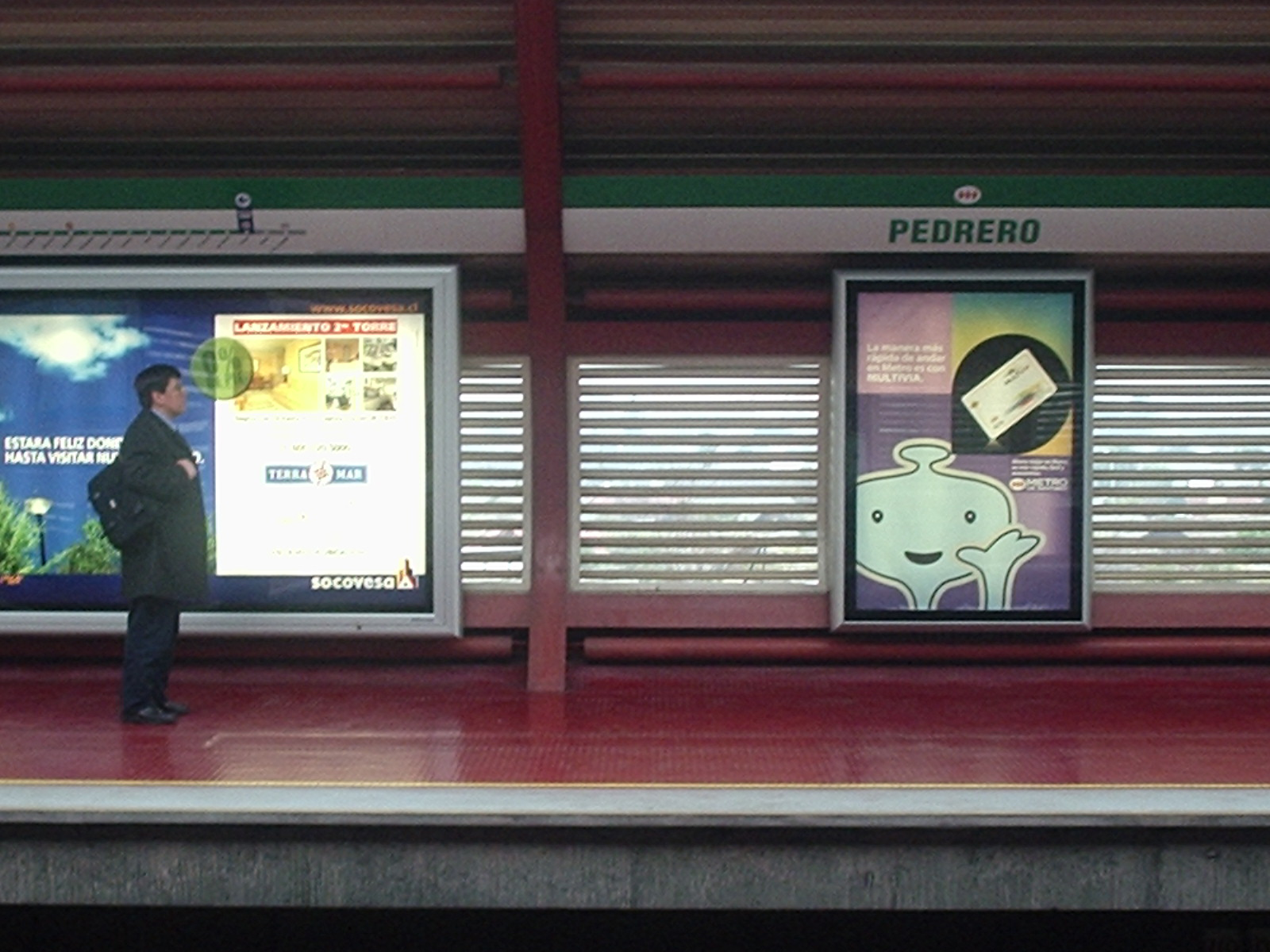 fotografía tomada en es:2004 por Der schöne Tod con la cámara fotográfica digital de su propiedad.